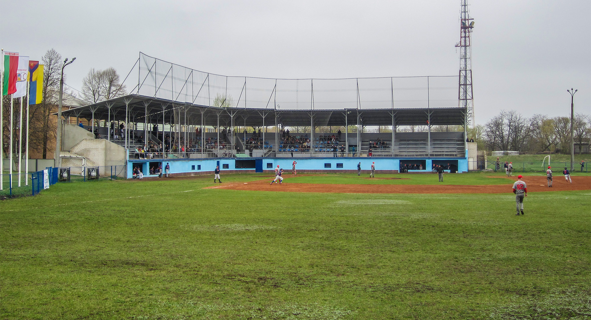 бейсбольний стадіон в місті Кропивницький